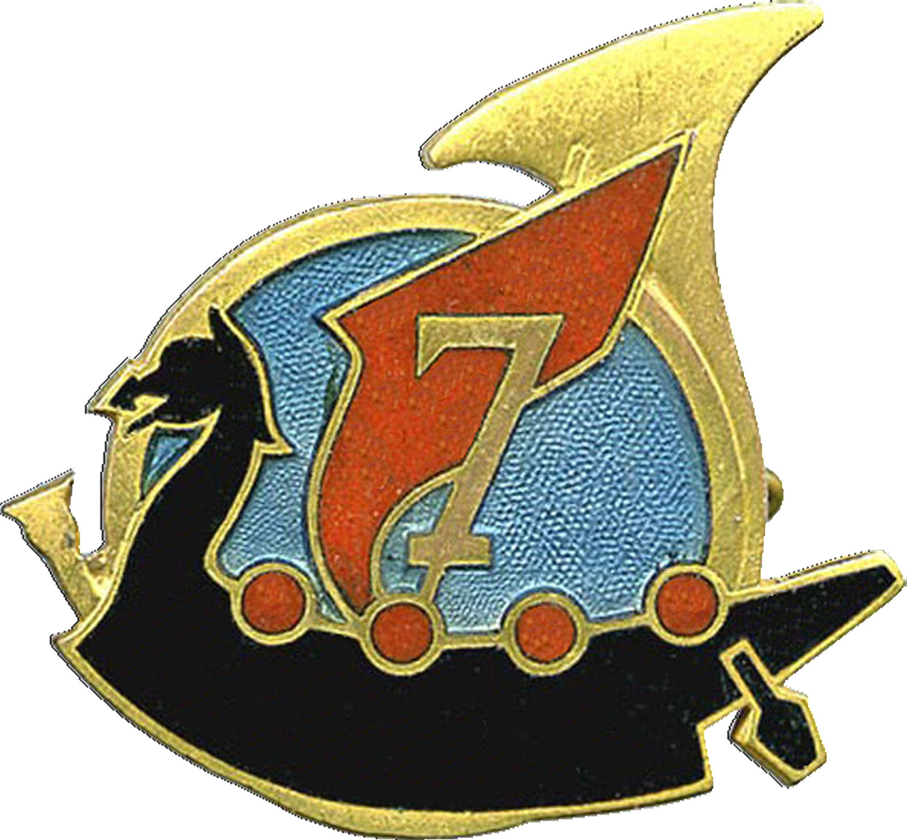 Insigne régimentaire 7e régiment de chasseurs à cheval (Arthus Bertrand)